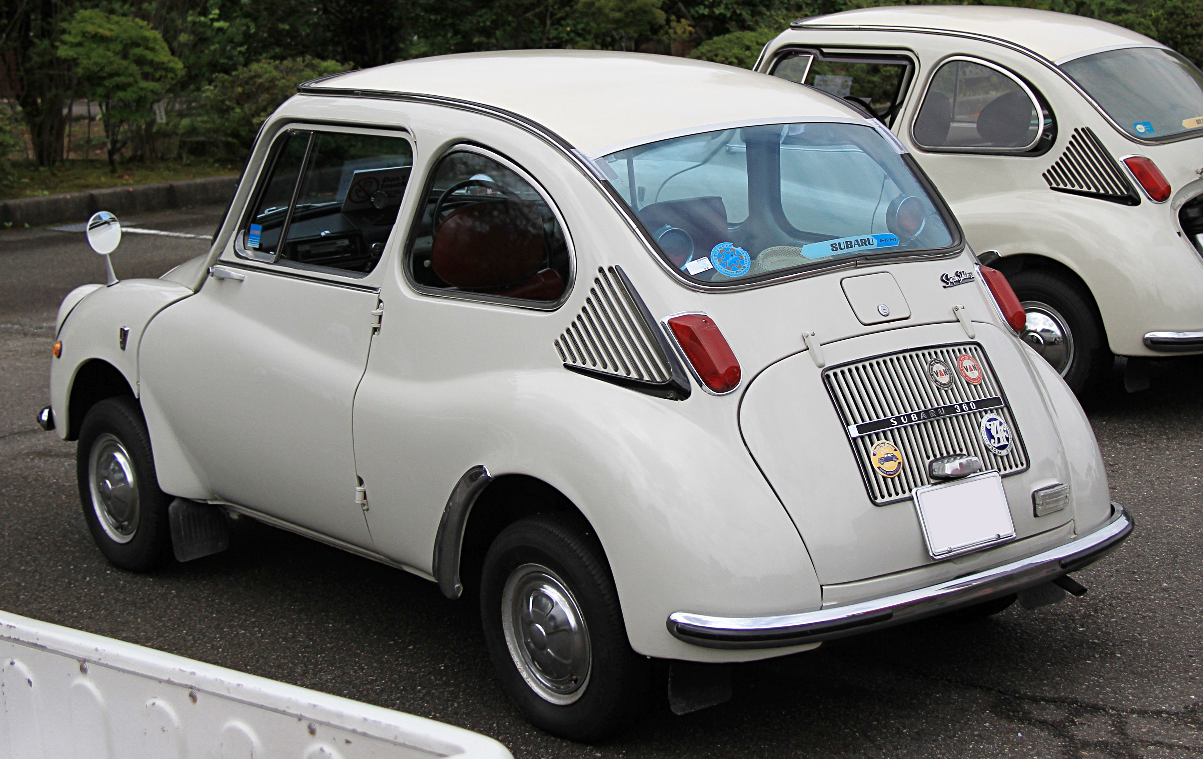 Subaru 360